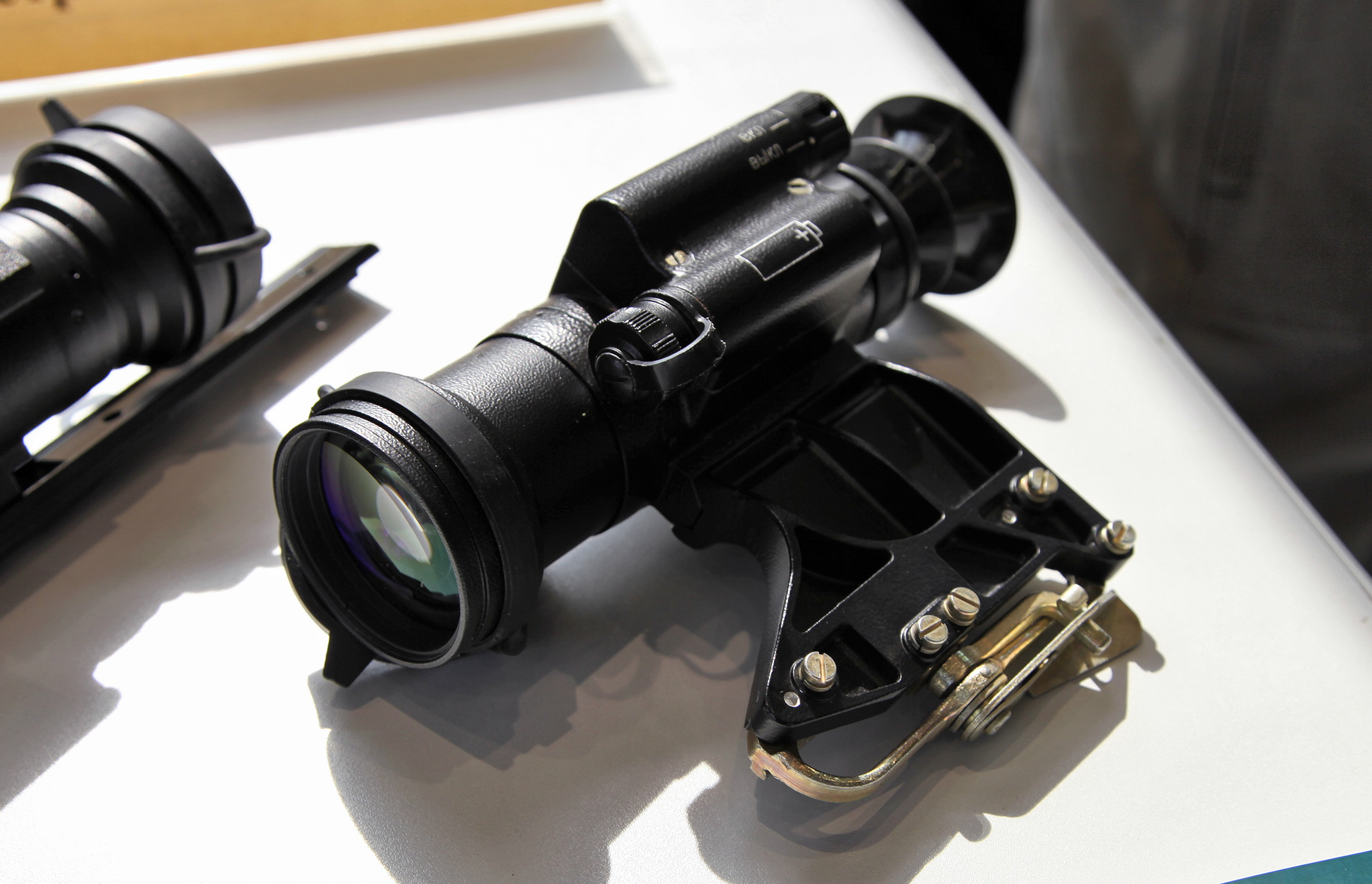 Прицел ночного видения 1ПН93-2